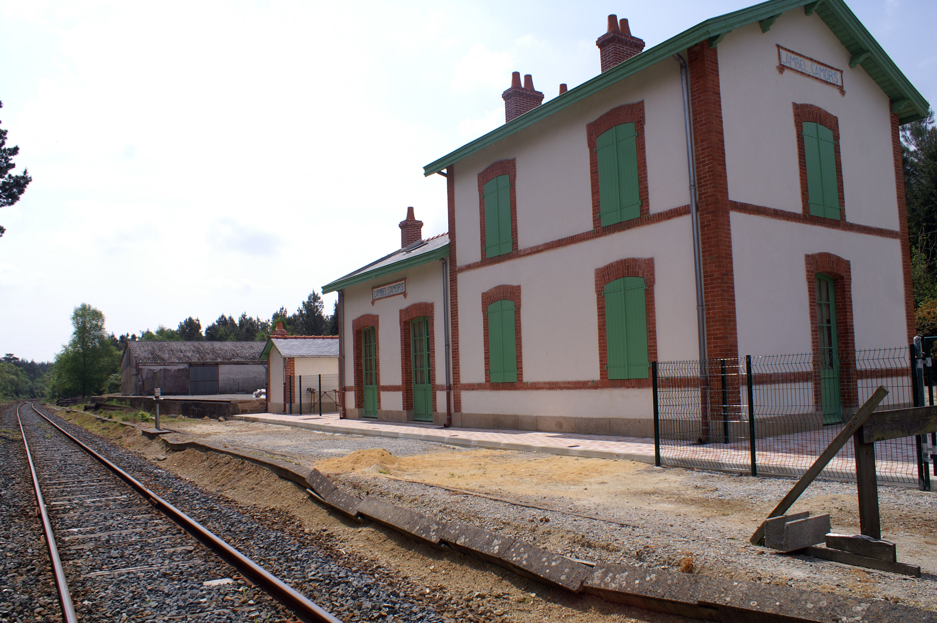 La gare de Lambel - Camors, bâtiment voyageurs et voie en direction d'Auray. On aperçoit l'ancien quai marchandise et un hangar de 1966.